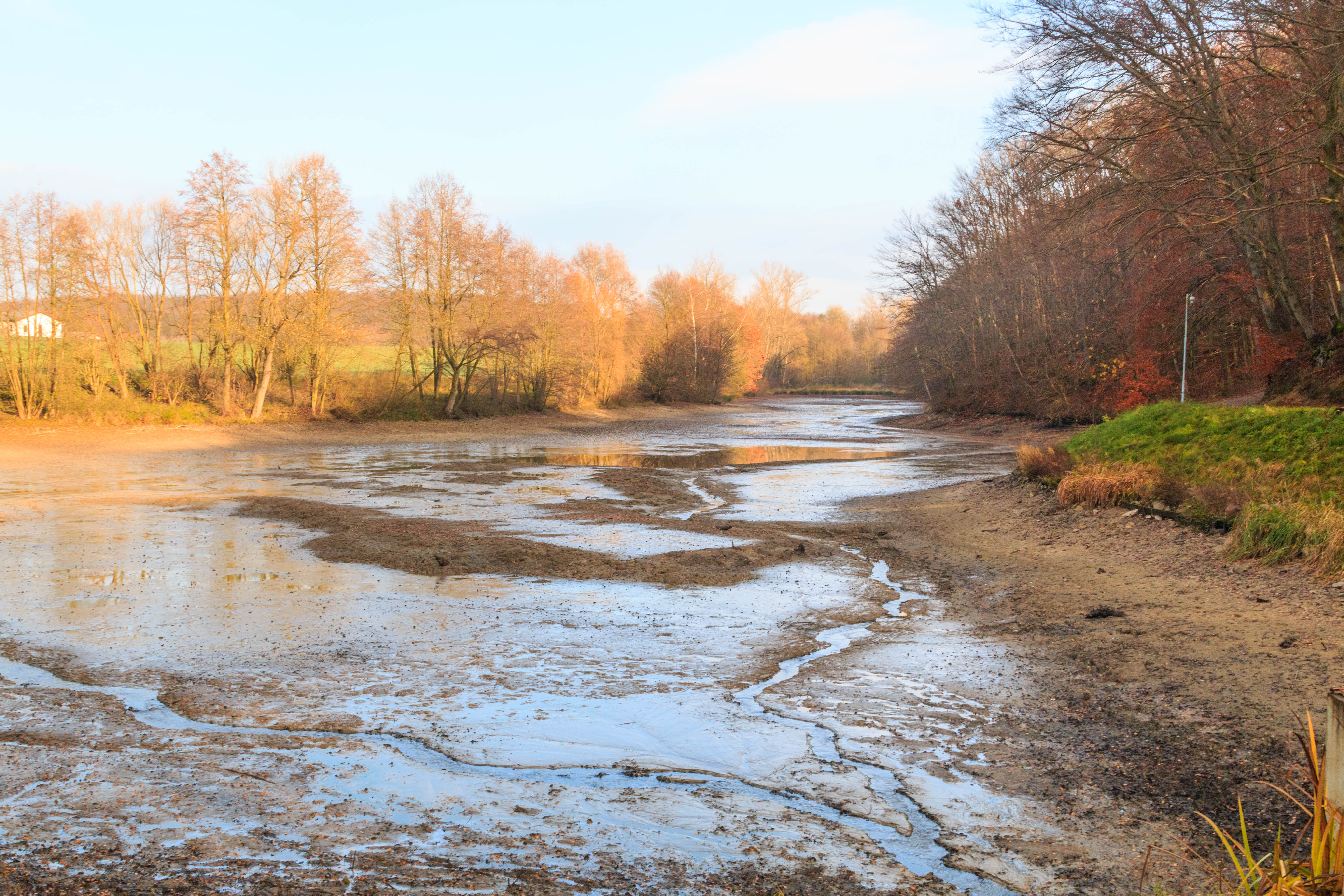 rybník Švihov u Žáravic Project: Vodstvo.